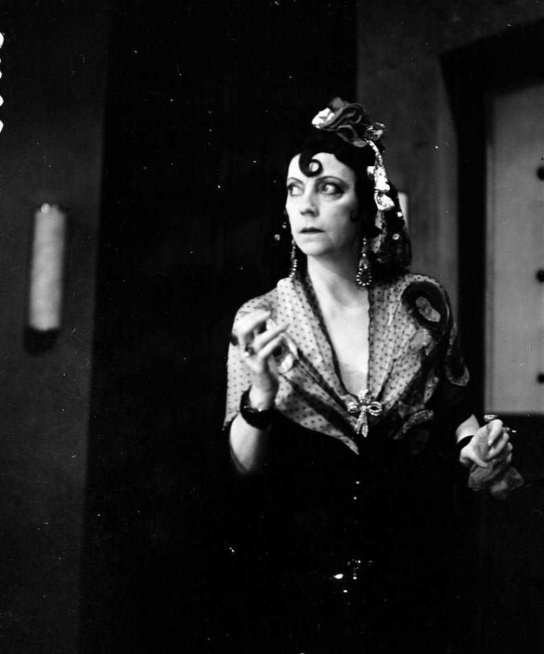 Kabarett der Komiker: Asta Nielsen; in: "Kriminalsketch Zimmer 16"; (Profil)